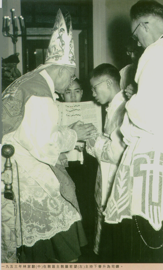 O Domingos Lam em 1953